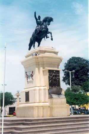 Plaza de Armas del Puerto de Pisco (Ica, Perú) donde desembarcó el general José de San Martín